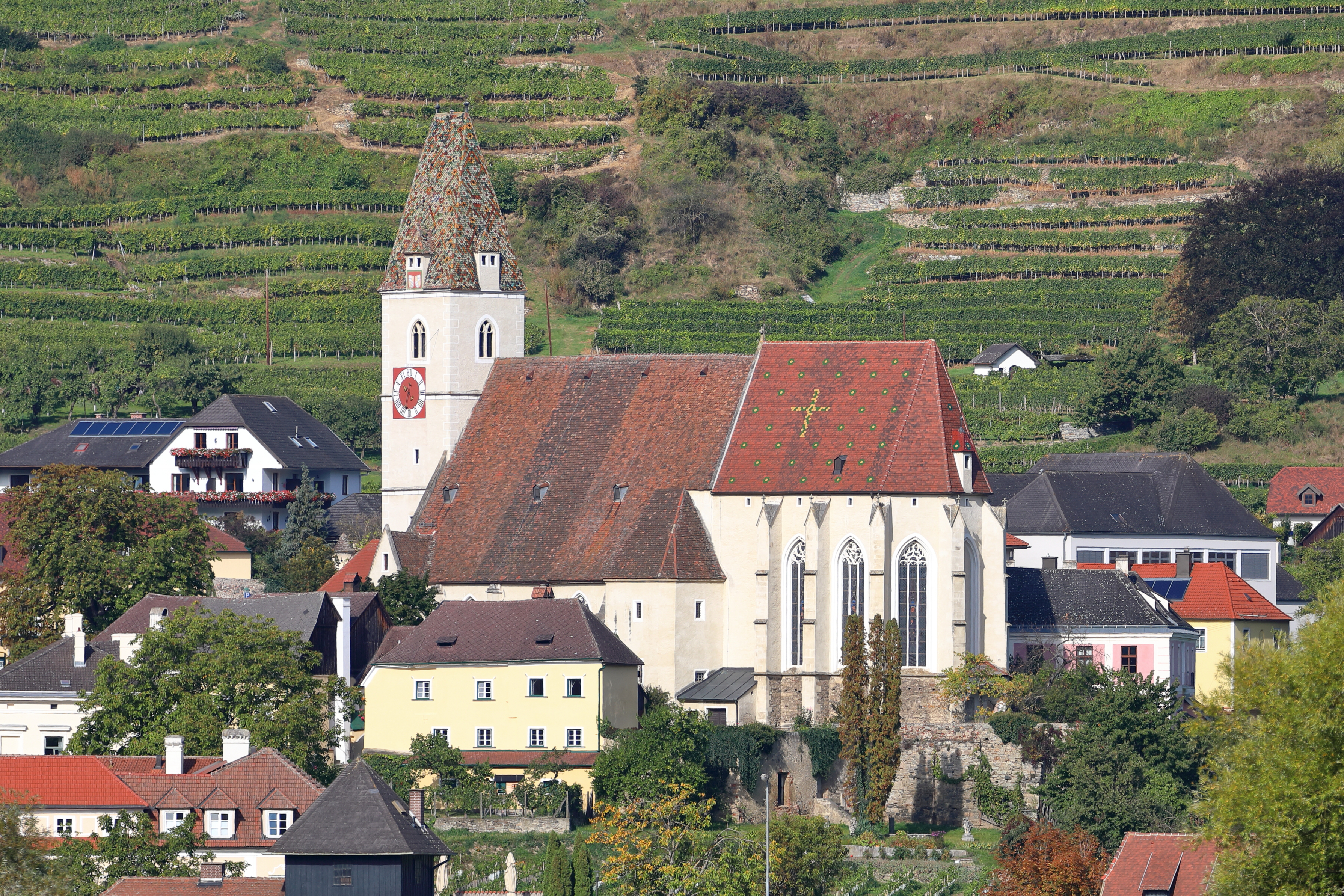 Südostansicht der röm.-kath. Pfarrkirche hl. Mauritius in der niederösterreichischen Marktgemeinde Spitz an der Donau. Eine spätgotische Hallenkirche mit vorgestelltem Westturm und einem stark aus der Achse geknickten Langchor, die in erhöhter Lage errichtet wurde.